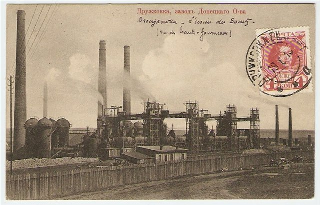 Дореволюционная открытка. Дружковка. Завод Донецкого общества.